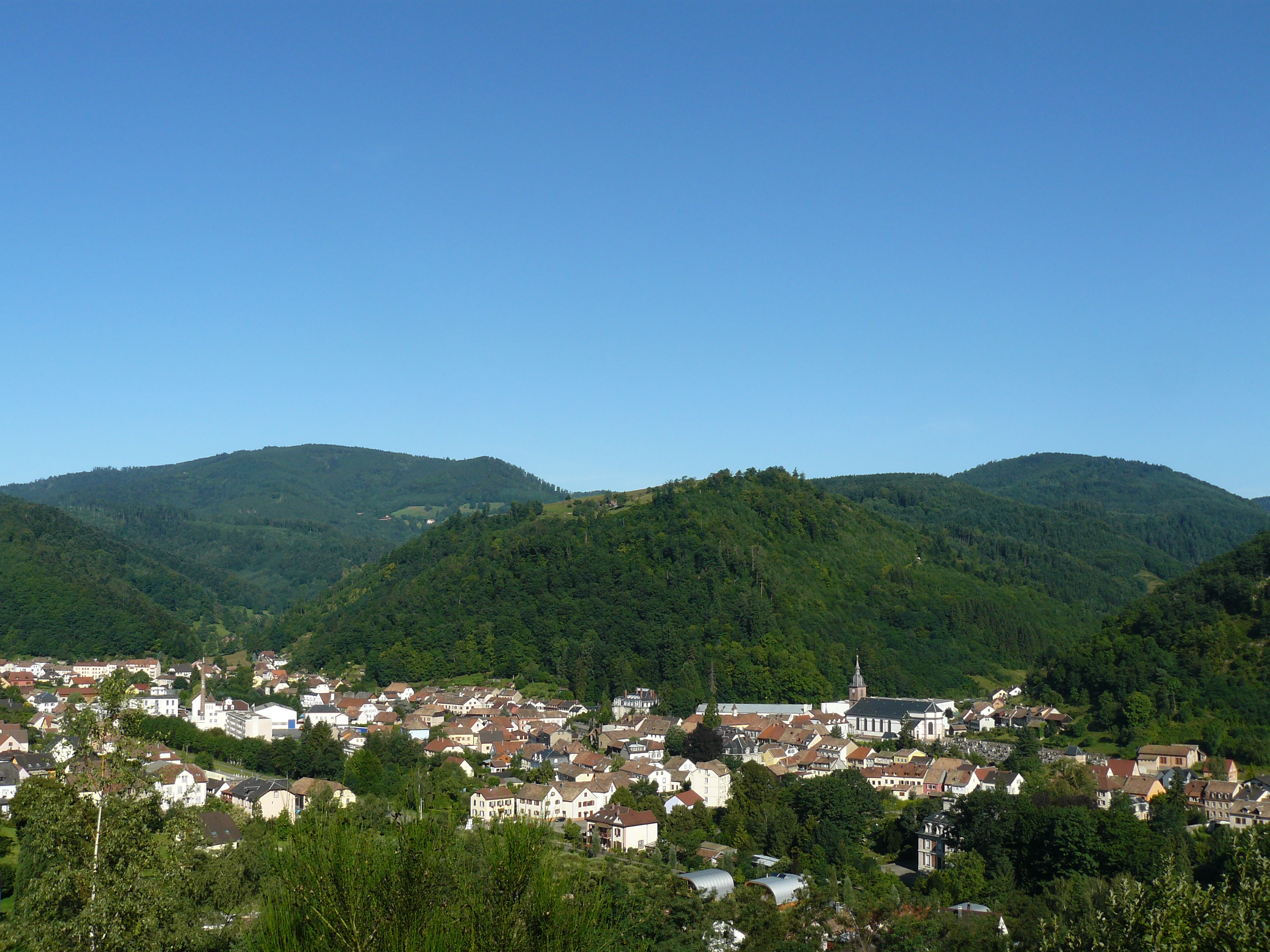 Aperçu du village de Sainte Croix-aux-Mines depuis la colline du Hajus